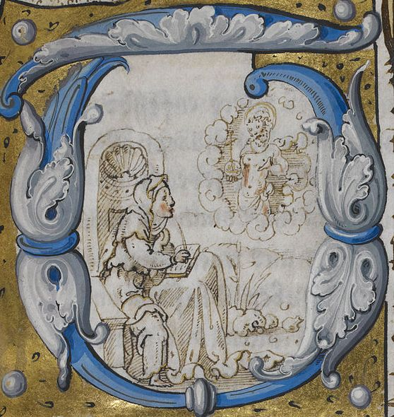 Мініяцюра Хрыстос і Брыгіта. 1530 г.